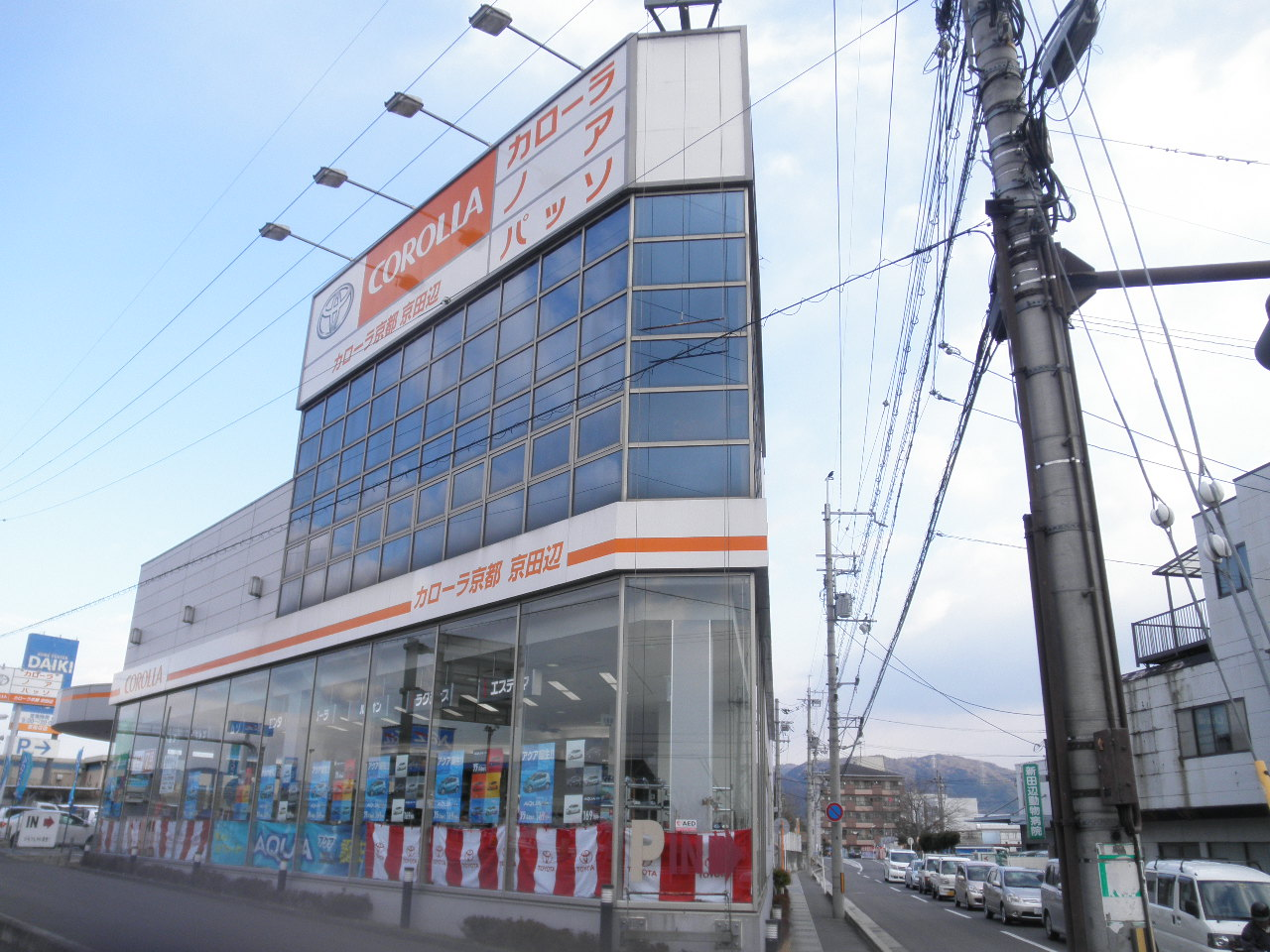 トヨタカローラ京田辺